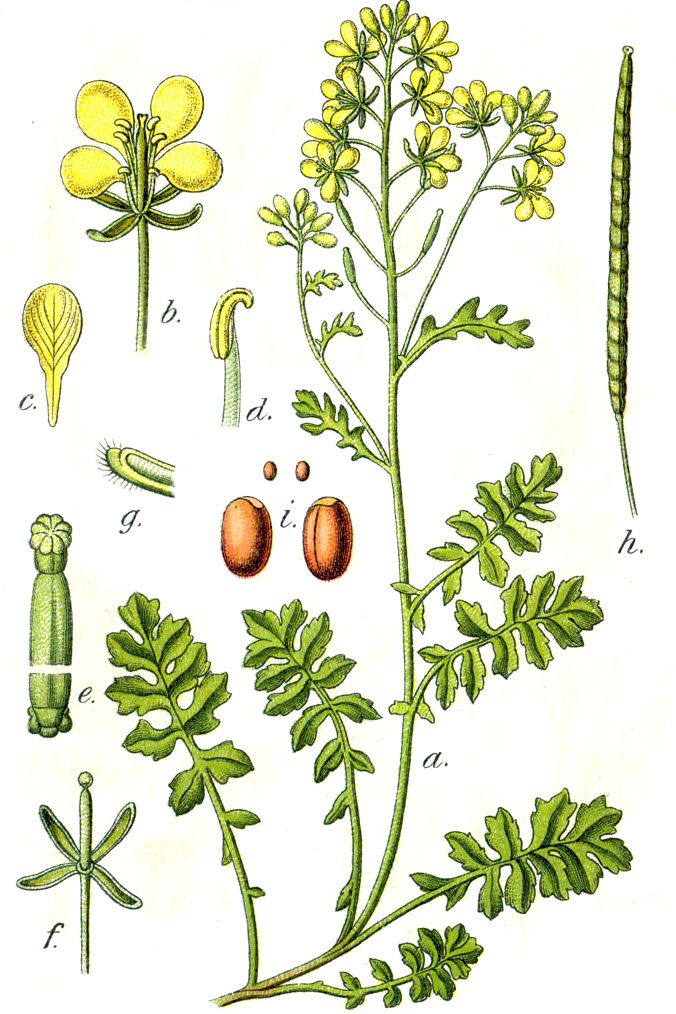 FloreAlpes: Erucastrum nasturtiifolium (Poir.) O. E. Schulz : Erucastrum nasturtiifolium subsp. nasturtiifolium, syn. Crucifera lamarckii E.H.L.Krause Brassica erucastrum, according to IPNI and Erucastrum gallicum according to ITIS. Original Caption Lamarck-Rauke, Crucifera lamarckii